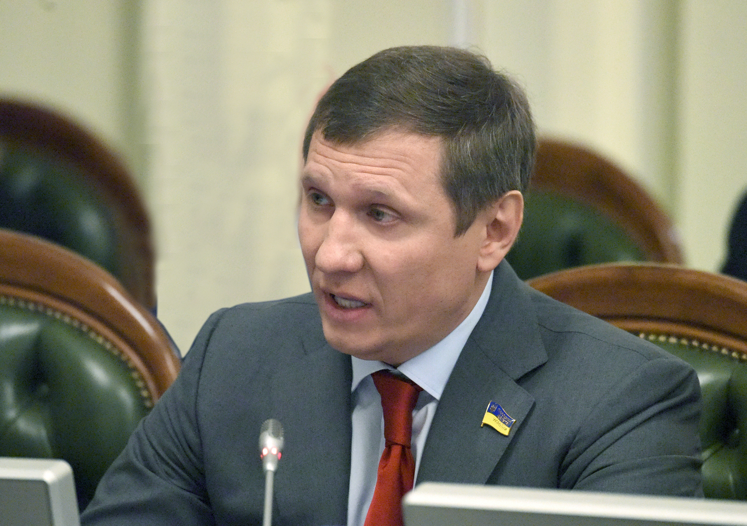 Верховная Рада Украины , фото Вадима Чуприна